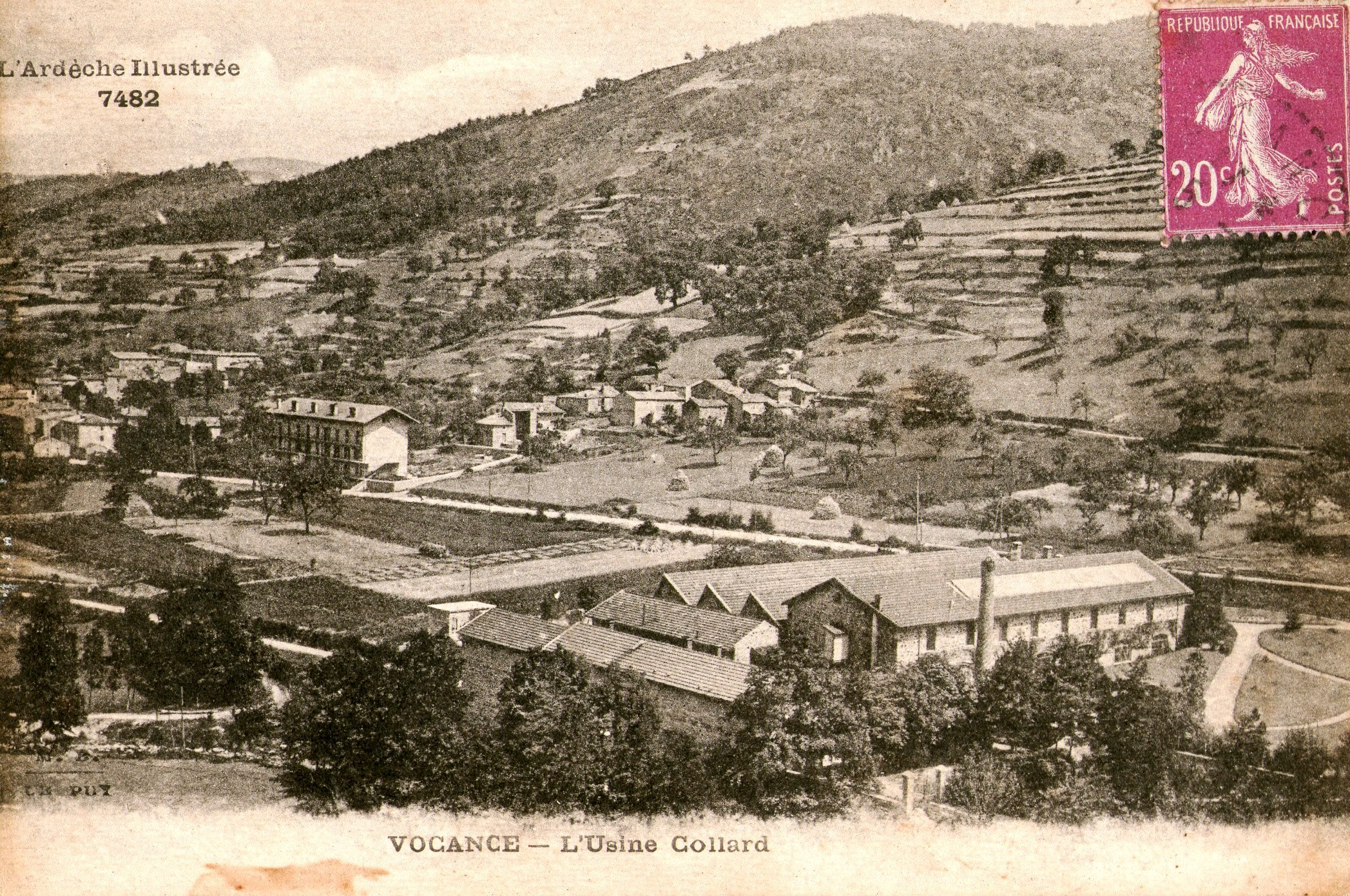 Vocance CP usine Collard